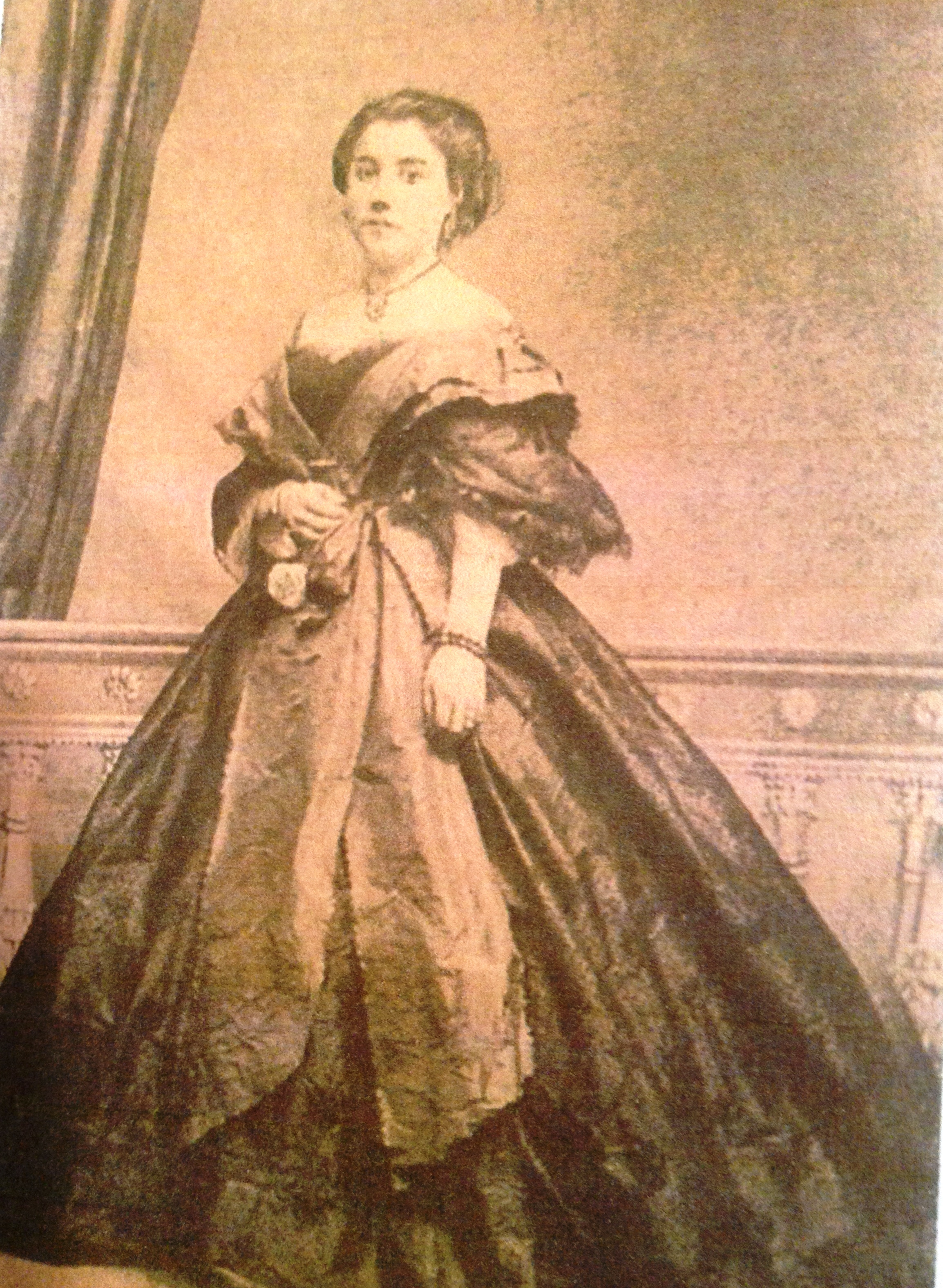 Retrato de una dama española del siglo XIX.